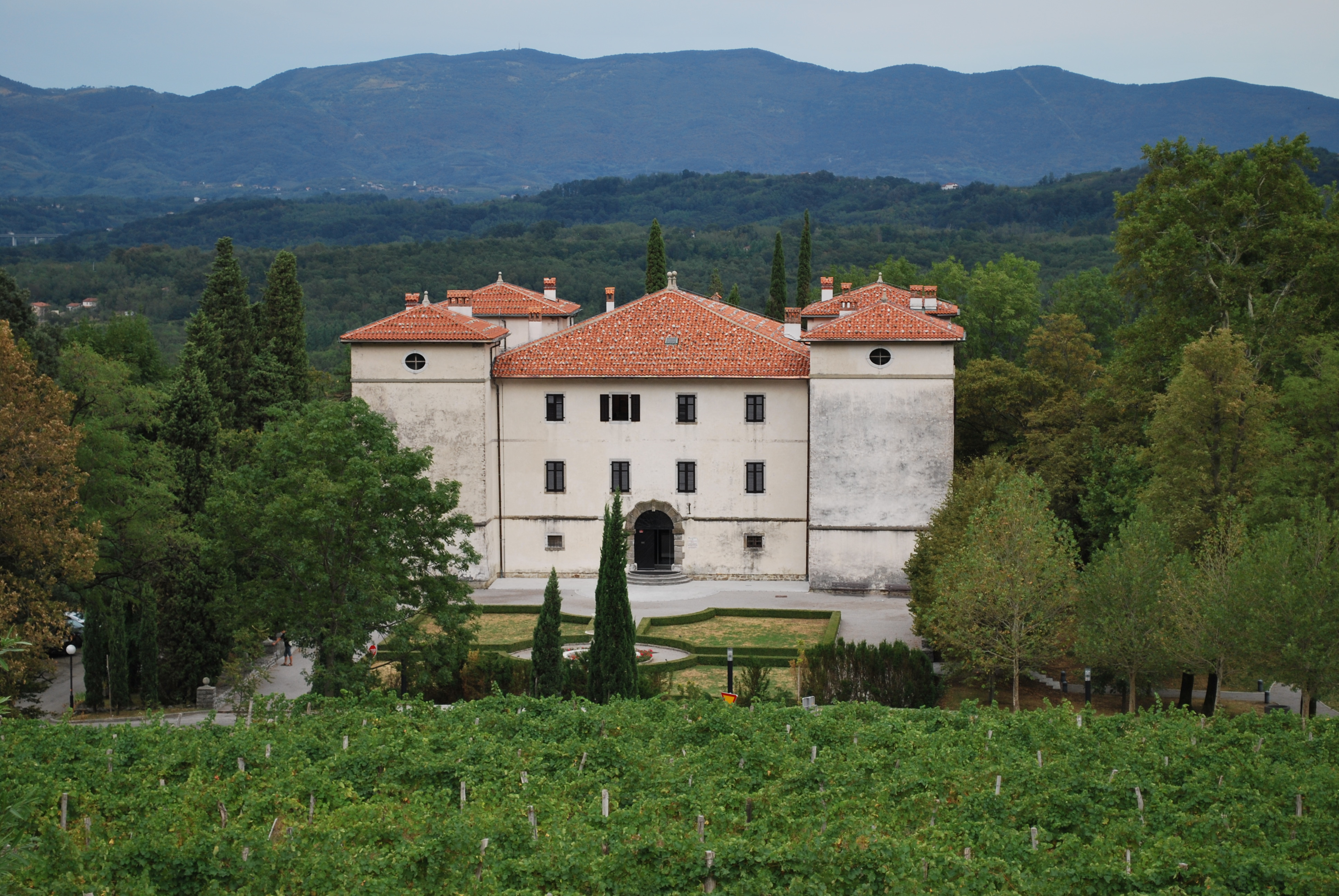 Ansicht des Schlosses Kromberk, Gemeinde Nova Gorica, Slowenien.